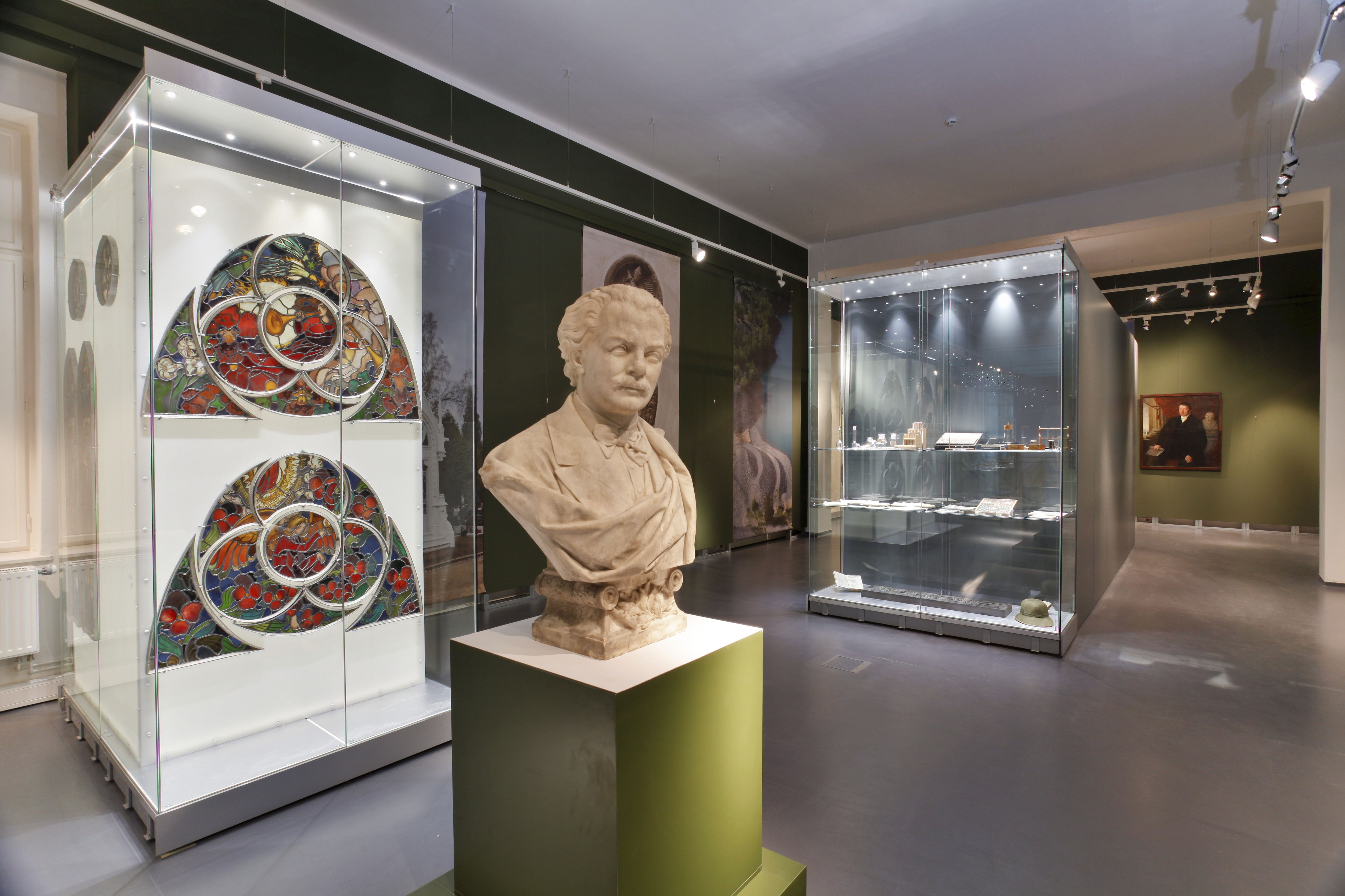 Slezské zemské muzeum - expozice Křídla myšlenek